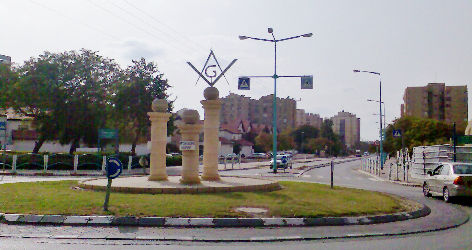 I shot it in 2008.